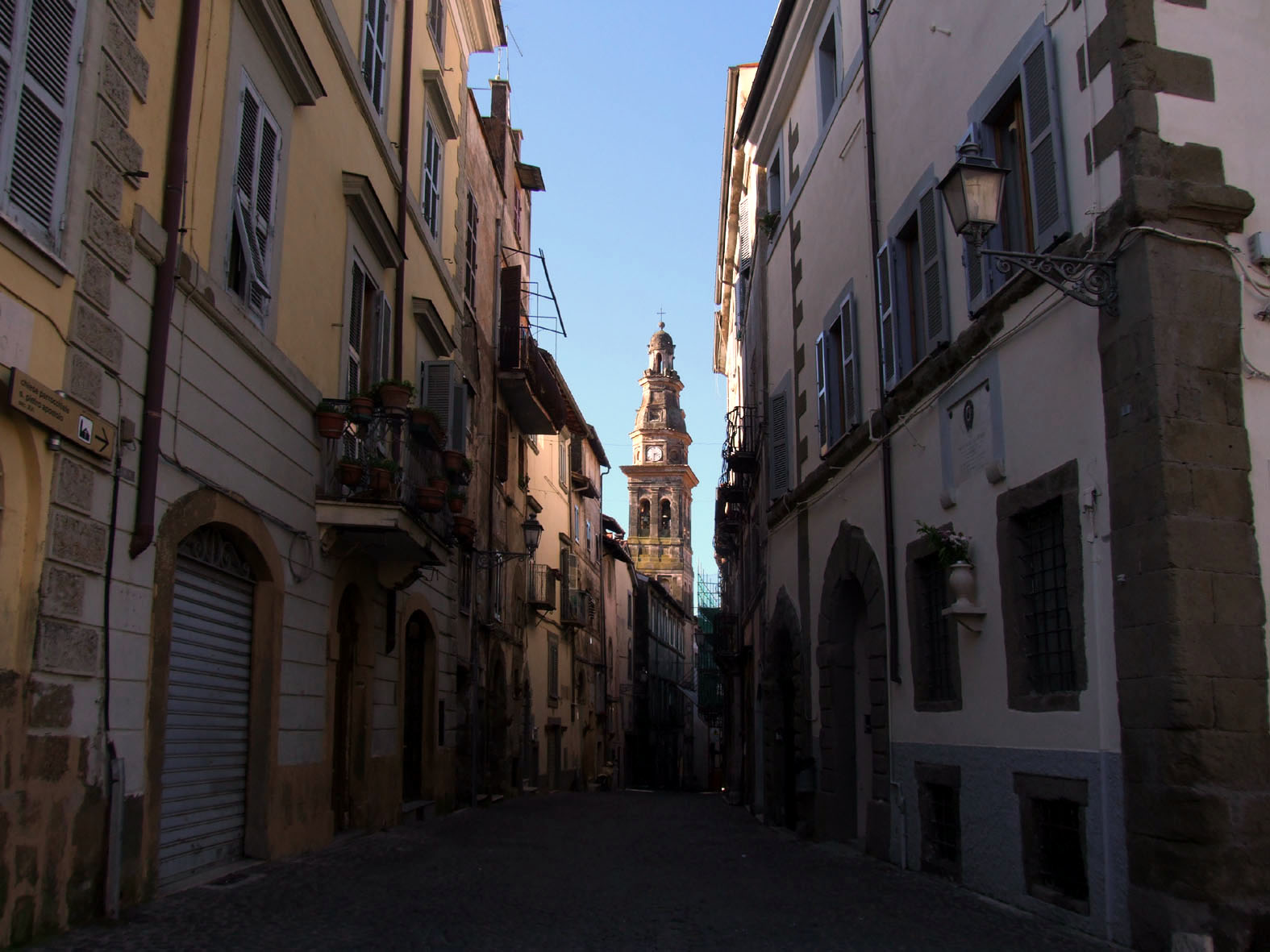 Poli RM